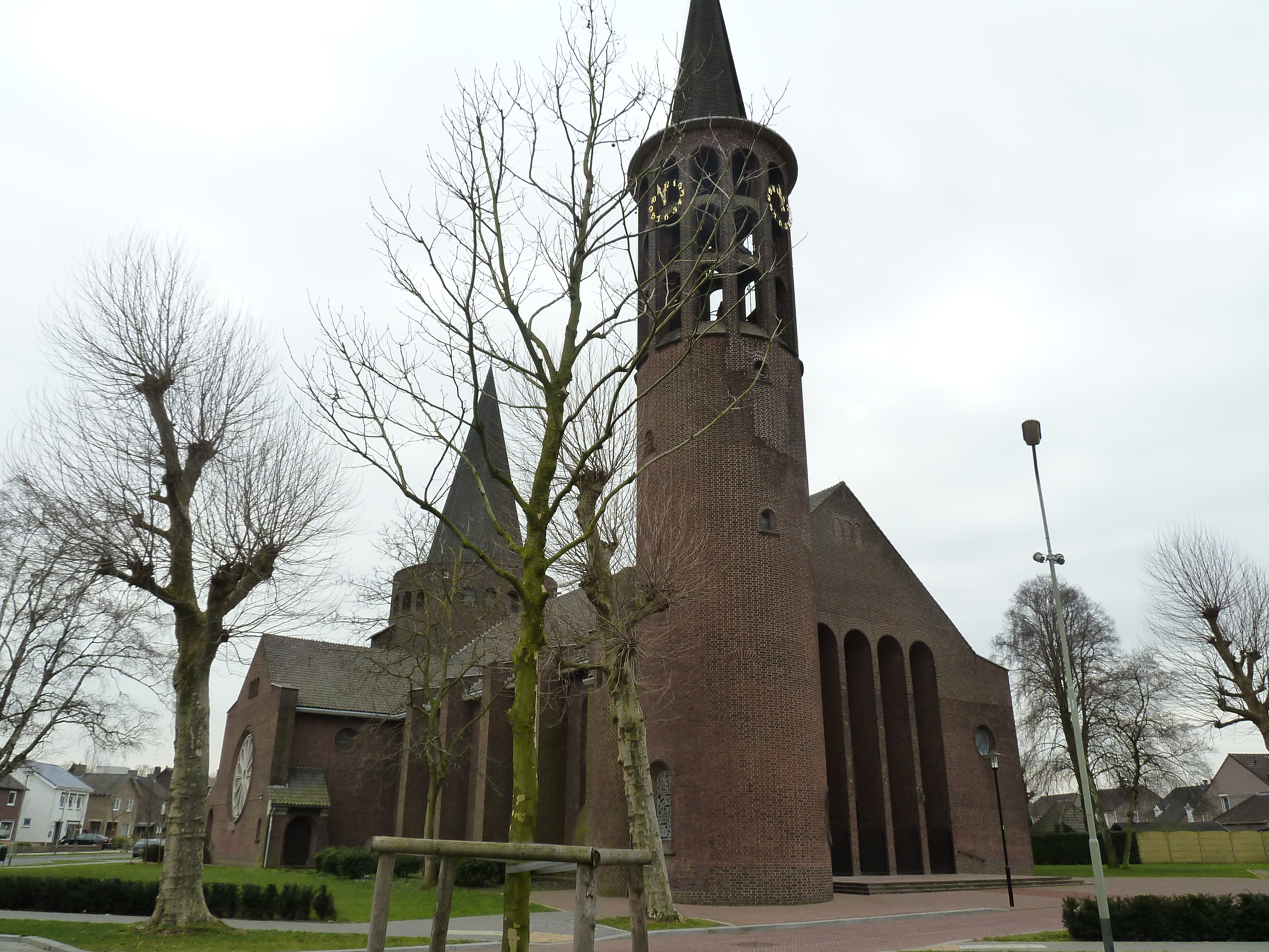 Sint-Jozefkerk in de wijk Kerensheide, Stein, Limburg, Nederland